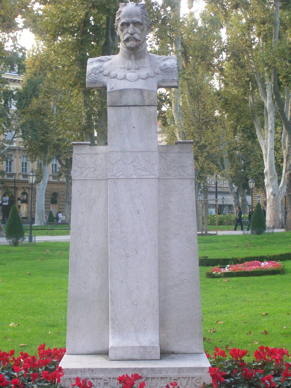 Ivan Kukuljević Sakcinski (Zagreb, Zrinjevac)